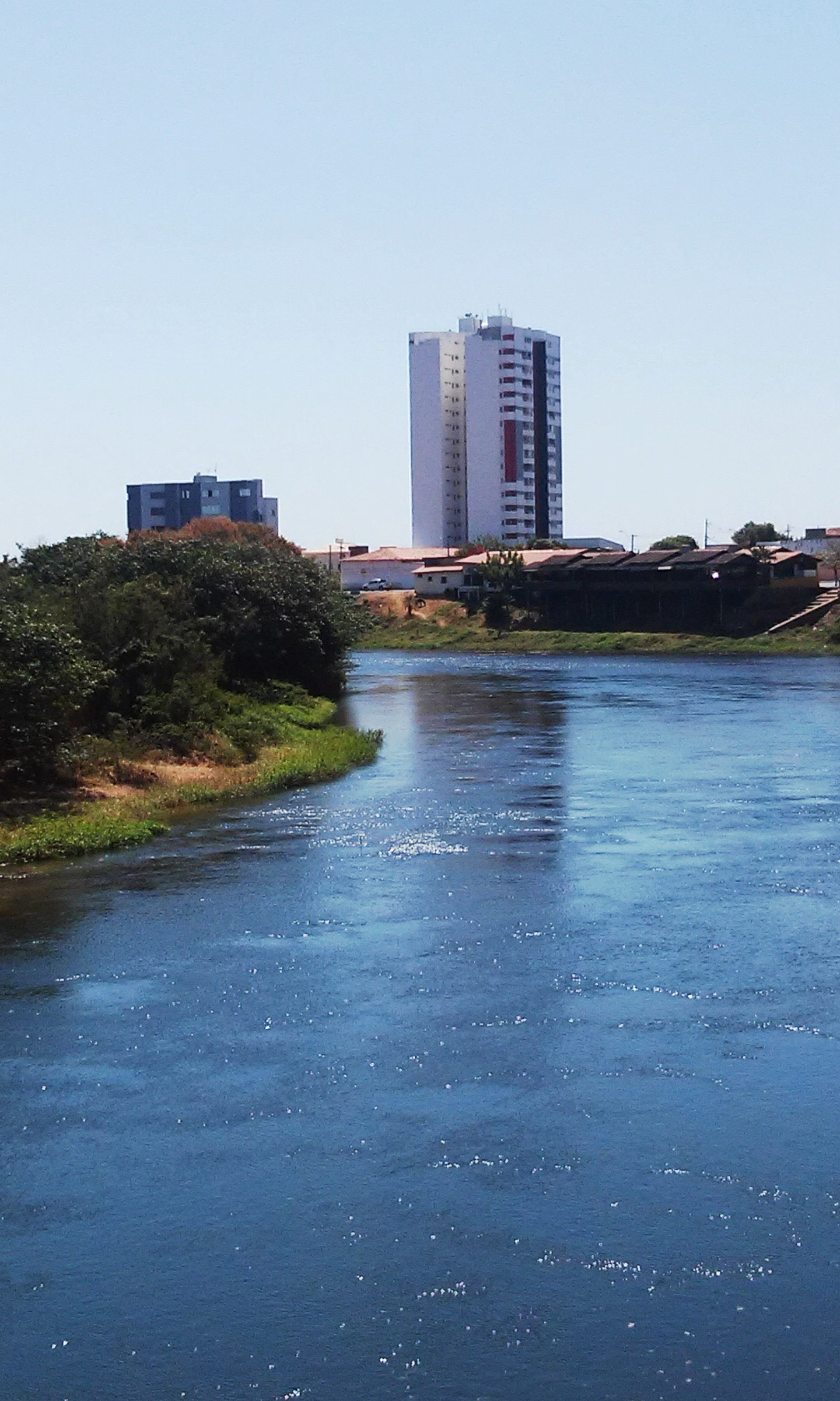 Foto de Barreiras no interior da Bahia.